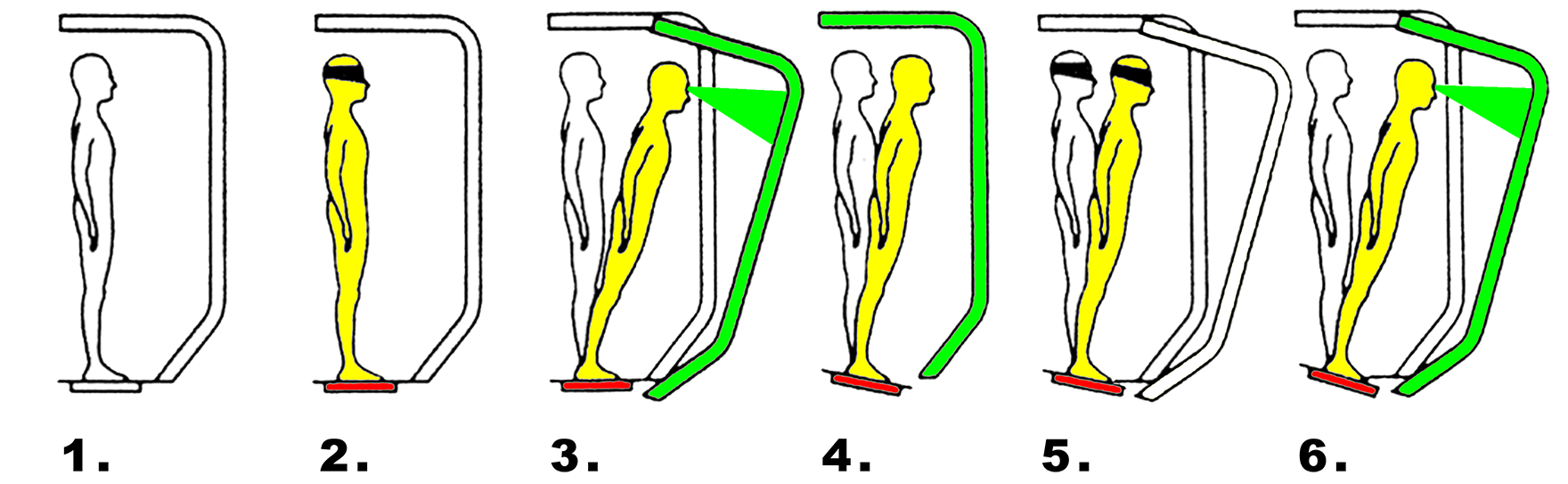 Módy přístroje pro měření posturální stability.